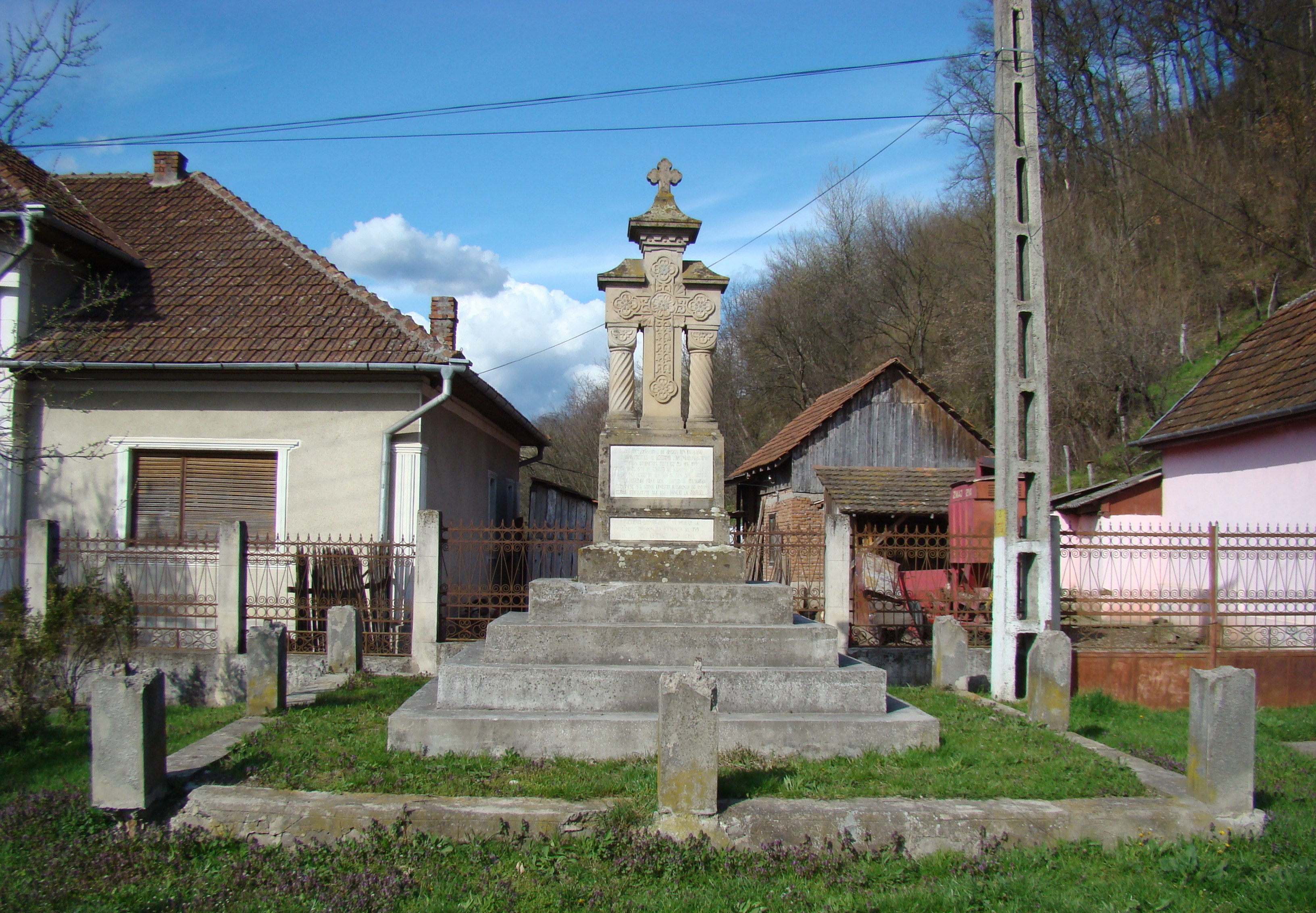 Troiţa lui Ioan Buteanu, strada Iosăşel, sat GURAHONŢ